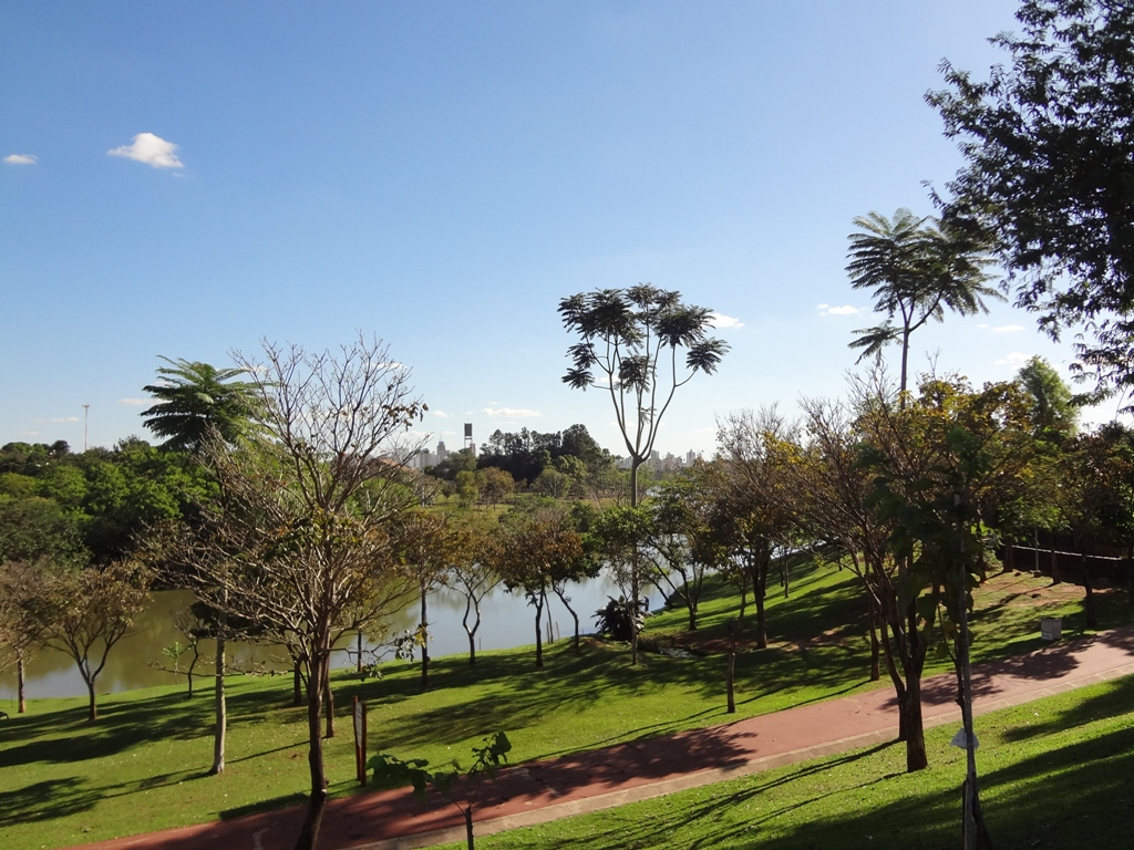 São José do Rio Preto, SP